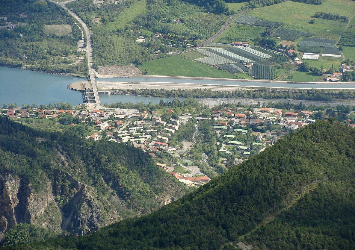 Vue vers le sud depuis le sommet du Mont Colombis : les cités de Rousset (les Celliers) et d'Espinasses, le bassin de compensation de Serre-Ponçon et la prise du canal EDF.